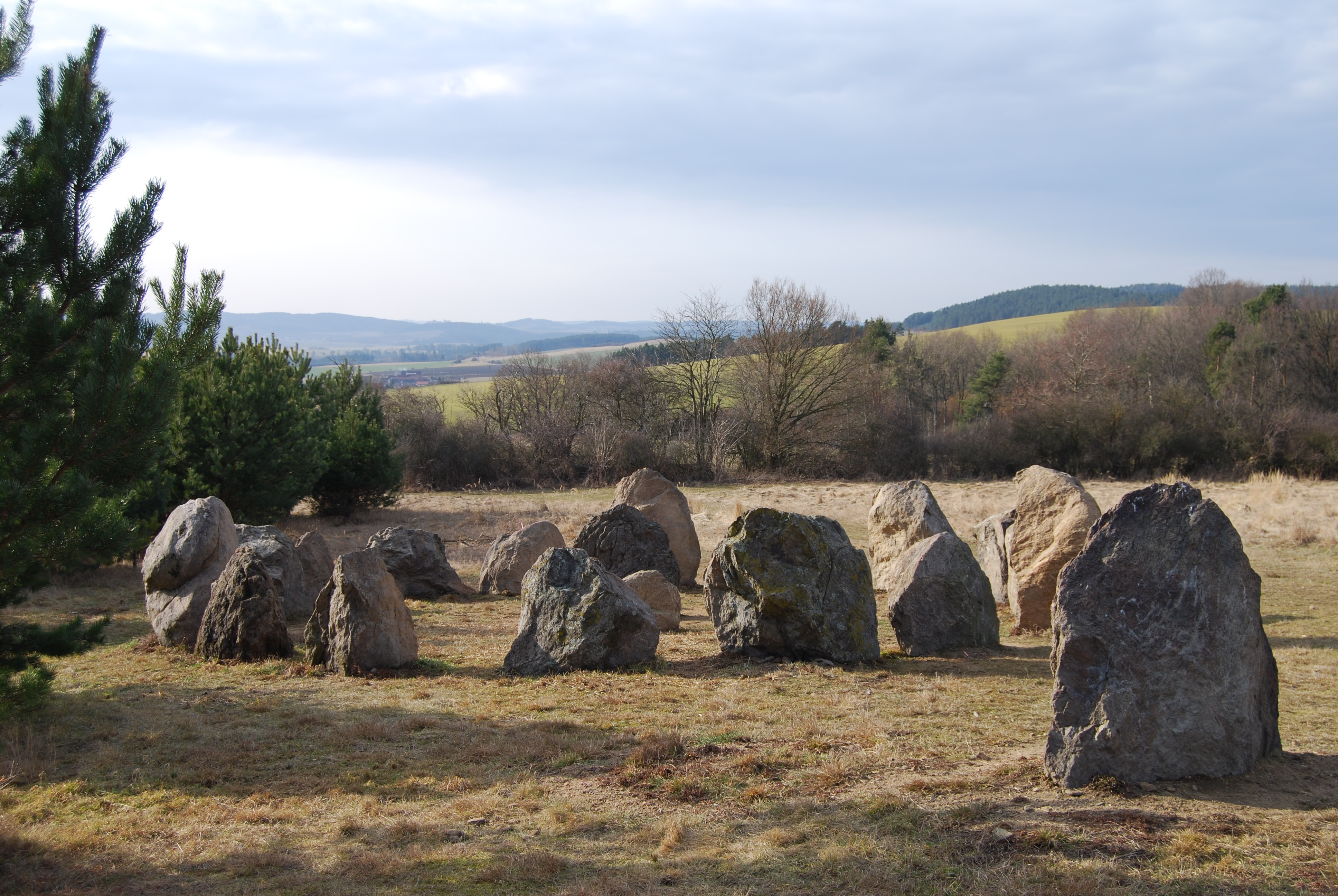 Novodobé megalitické stavby v katastru obce nedaleko pod horou Tábor. Nazývají se Kruh. Nemějice je malá vesnice, část obce Slabčice v okrese Písek. Česká republika.